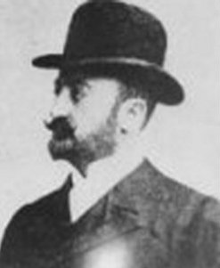 Quittner Zsigmond magyar építész.